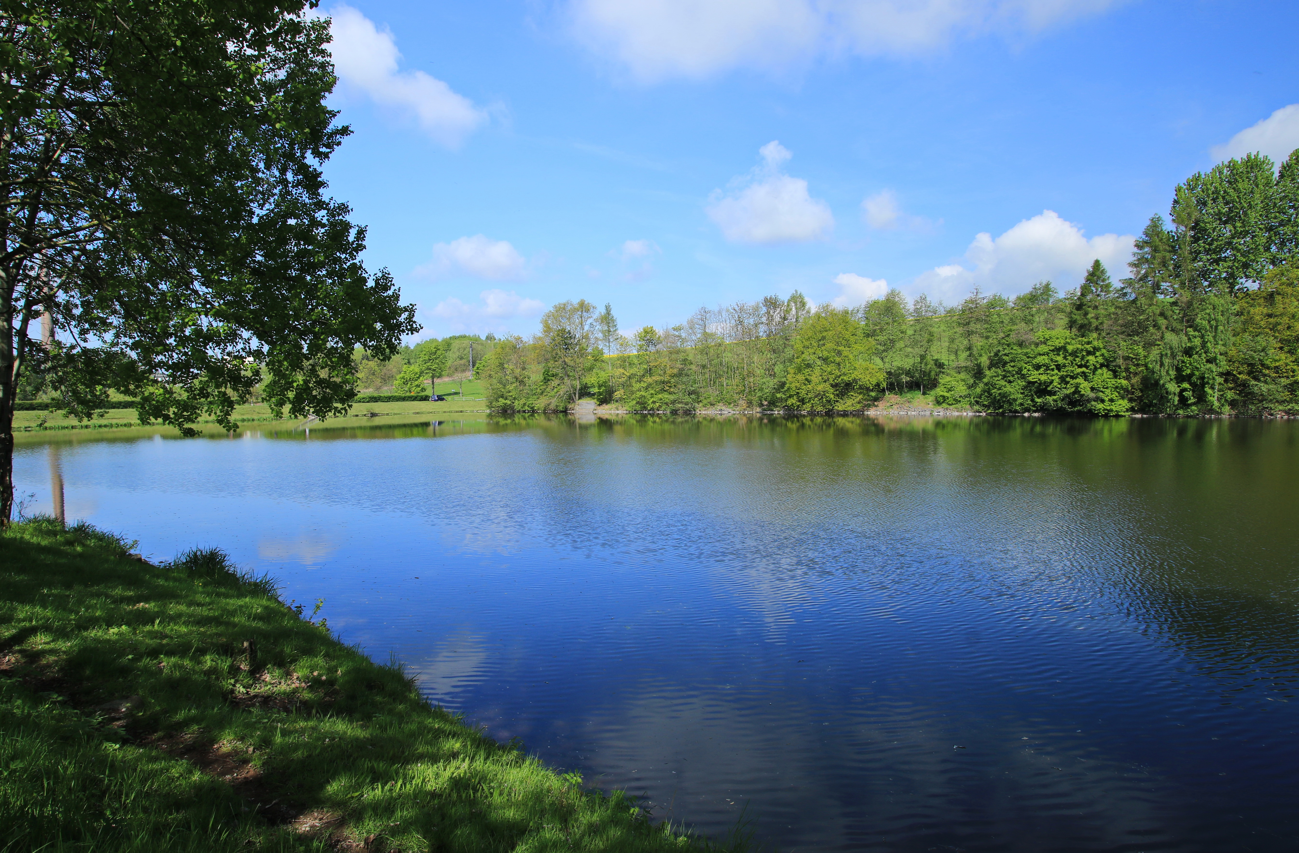 Talsperre St. Egidien in Sachsen.